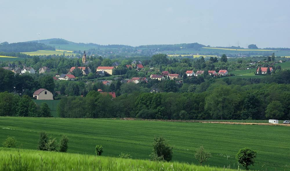 SKH Großschweidnitz, Sachsen, Deutschland